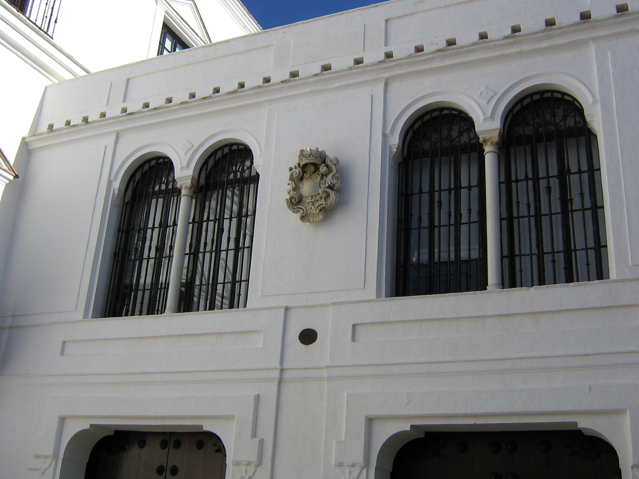 Detalle de la fachada exterior del Palacio del Duque de Medina Sidonia en Sanlúcar de Barrameda (Cádiz)